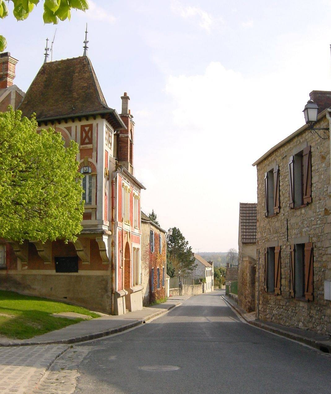 Le Presbytere sur la place de la Mairie de Soisy sur Ecole